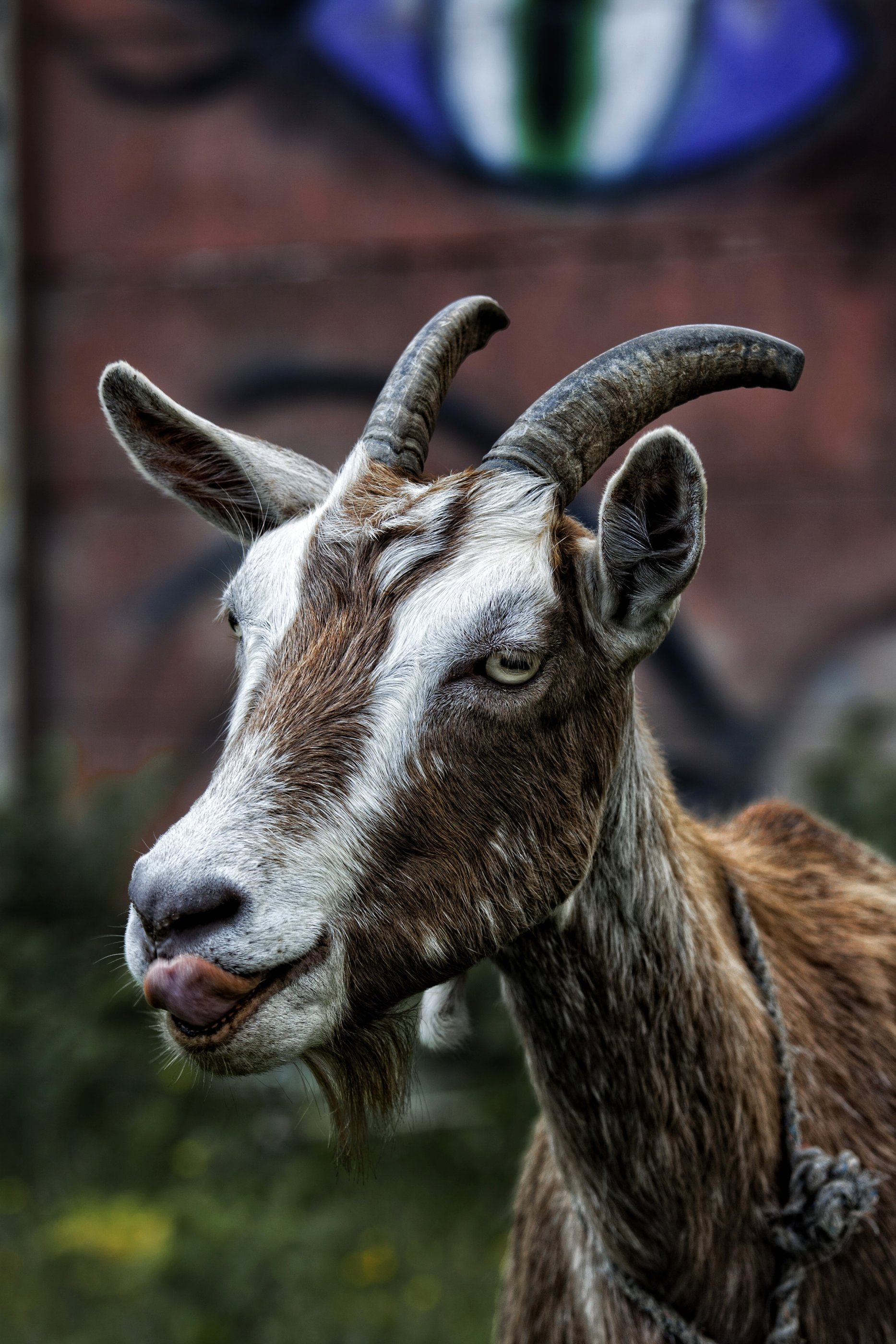 Cabuxa en Moraña, Galicia (Spain)